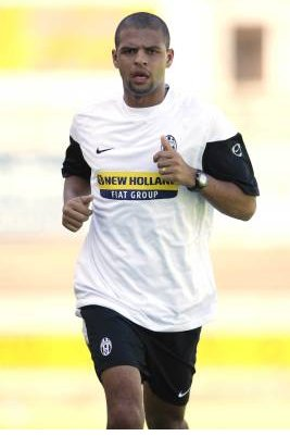 Primi allenamenti MELO